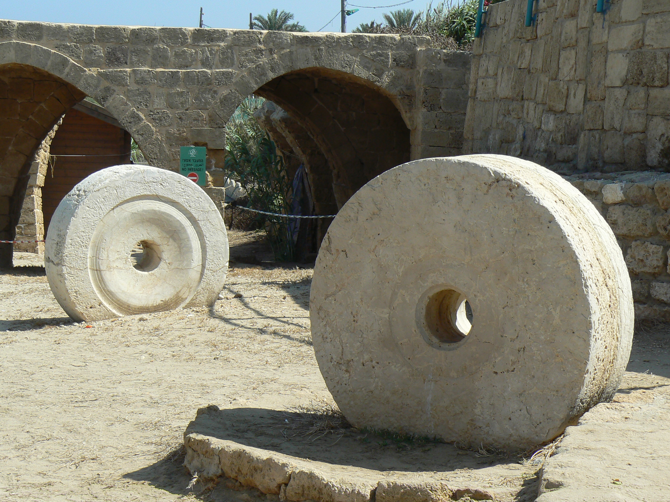 שמורת אכזיב. צילם י.ש. 14:39, 9 בספטמבר 2006 (IDT)